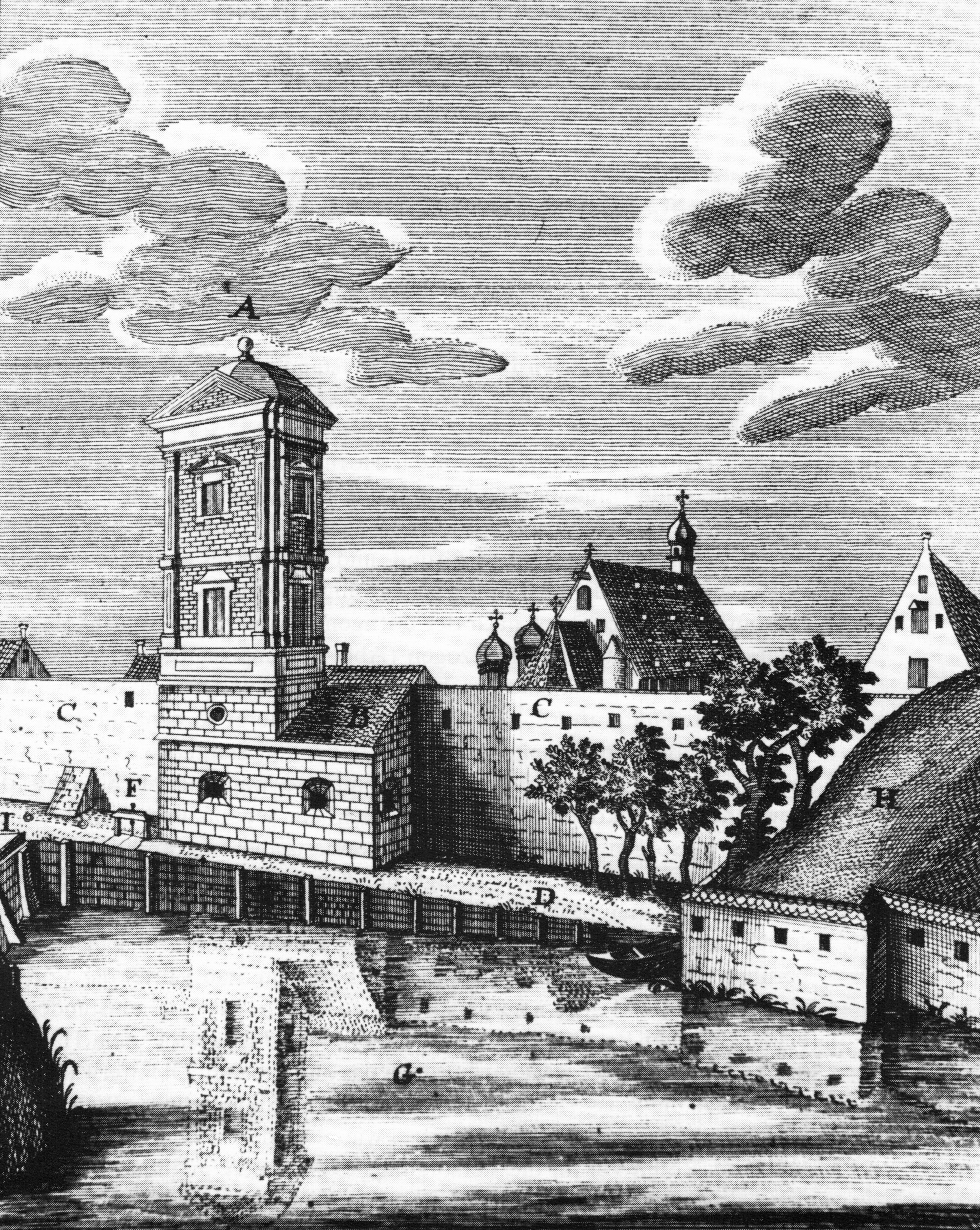 Der Untere Sankt-Jakobs-Wasserturm in Augsburg. Stich von Johann David Nessenthaler nach einer Zeichnung von Caspar Walter.